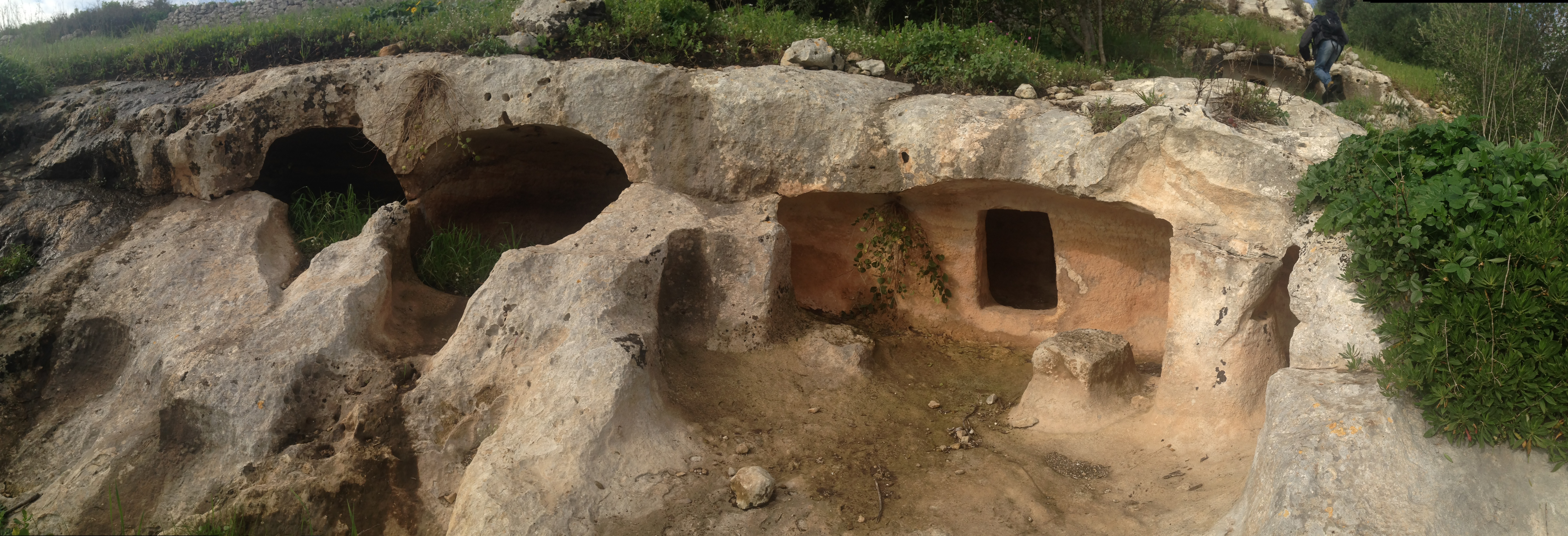 Necropoli Calicantone